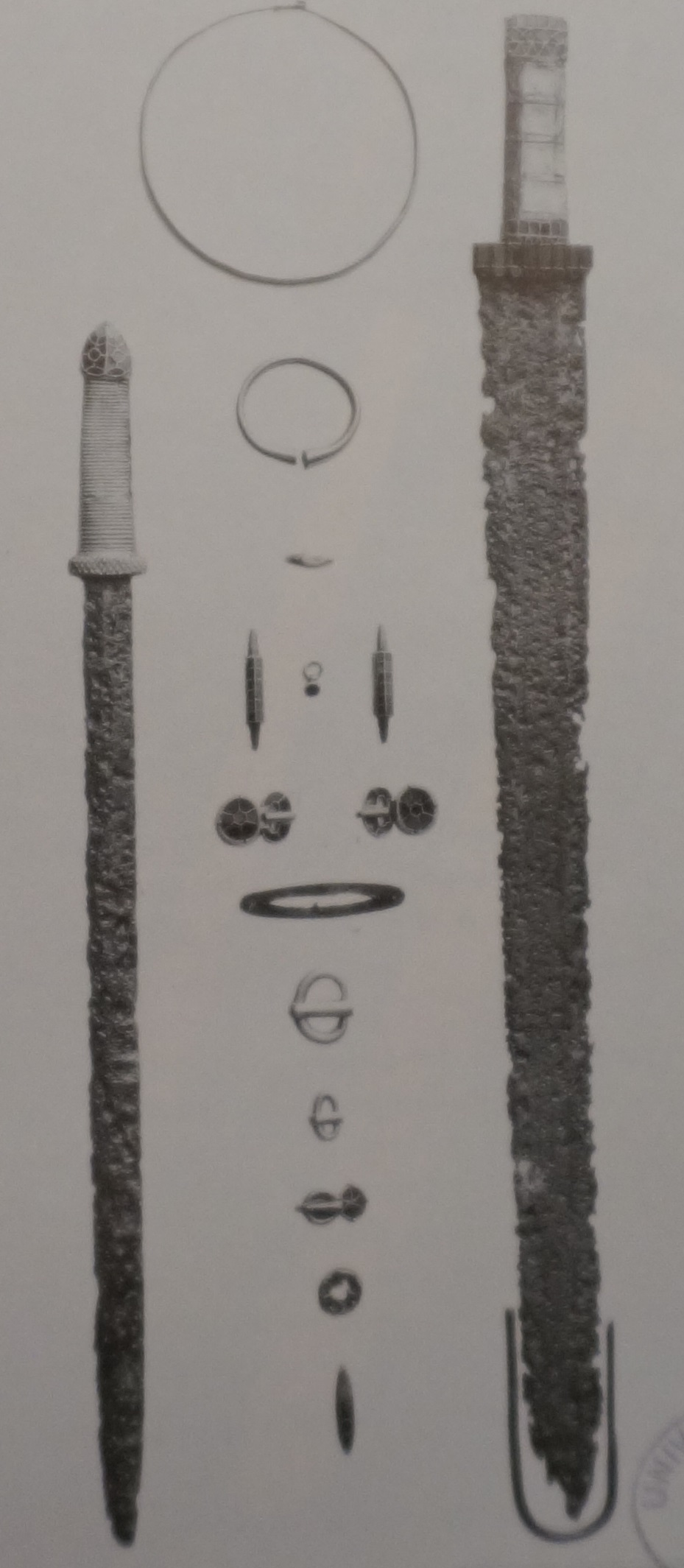 objets du trésor de Pouan relevés par Corrard de Bréband.